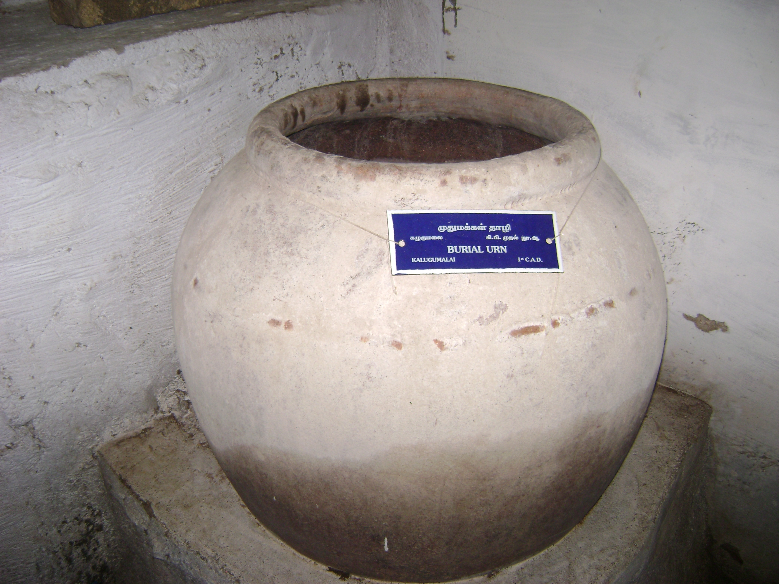 முதுமக்கள் தாழி, குற்றாலம் தொல்லியல் அருங்காட்சியகம்